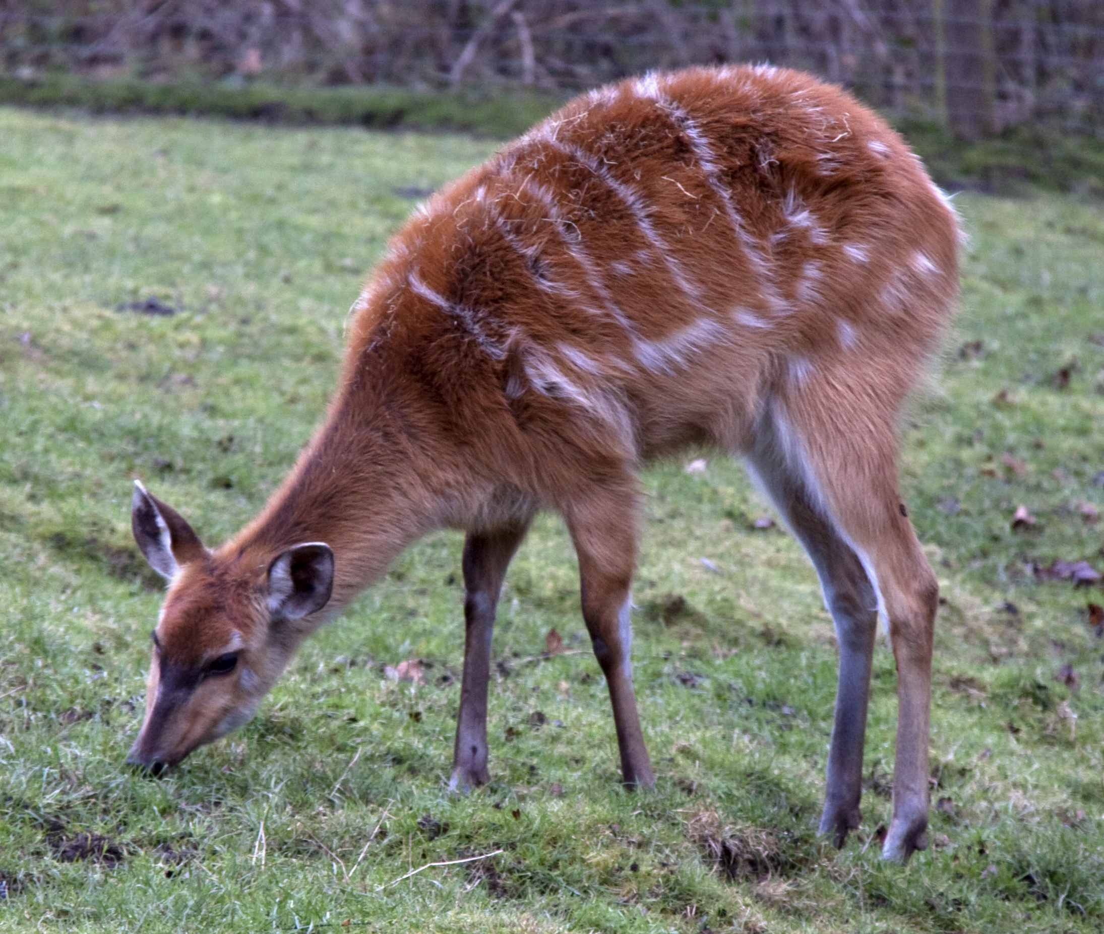 Sitatunga